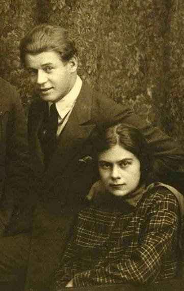 часть фотографии